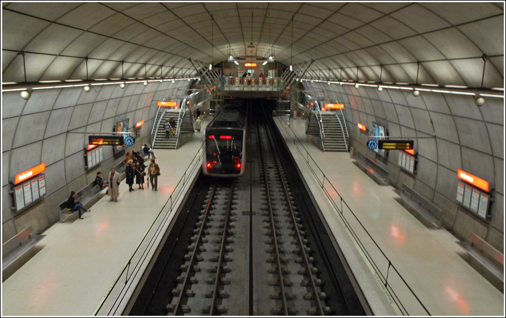 C'est l'architecte Norman Foster et ses associés qui ont été retenu en 1988 pour le design du métro de Bilbao. Deux lignes desservent depuis 1995 l'agglomération qui comprend aujourd'hui plus d'un million d'habitants, et qui s'étend jusqu'à la mer. "L’équipe de Sir Norman Foster a été chargée de la définition des stations souterraines en galerie du métro de Bilbao. En plus des conceptions d’originalité, de simplicité et d’efficacité qui sont présentes dans tout oeuvre de Foster, il y a une idée directrice qui a déterminé très positivement les travaux du métro de Bilbao: l’integration de l’architecture et de l’ingénierie, ce qui s’apprécie tout particulièrement dans les espaces fluides de sa création."